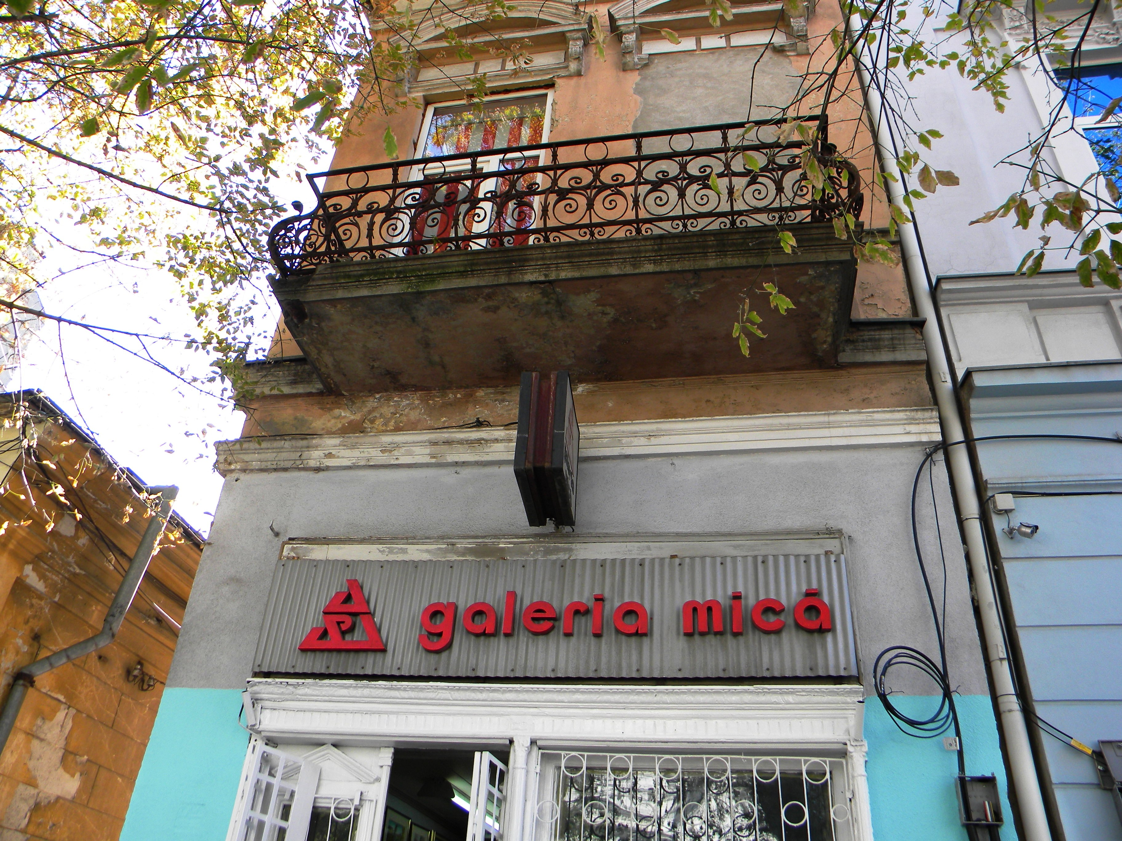 Bucuresti, Romania, Casa pe Str. Grivitei nr. 89, sect. 1